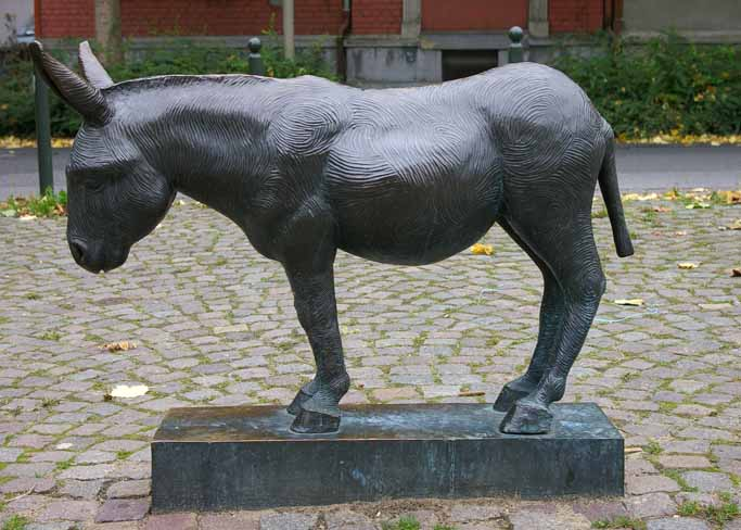 Witten-Mitte, Krone, Eselsmarkt, Esels-Plastik